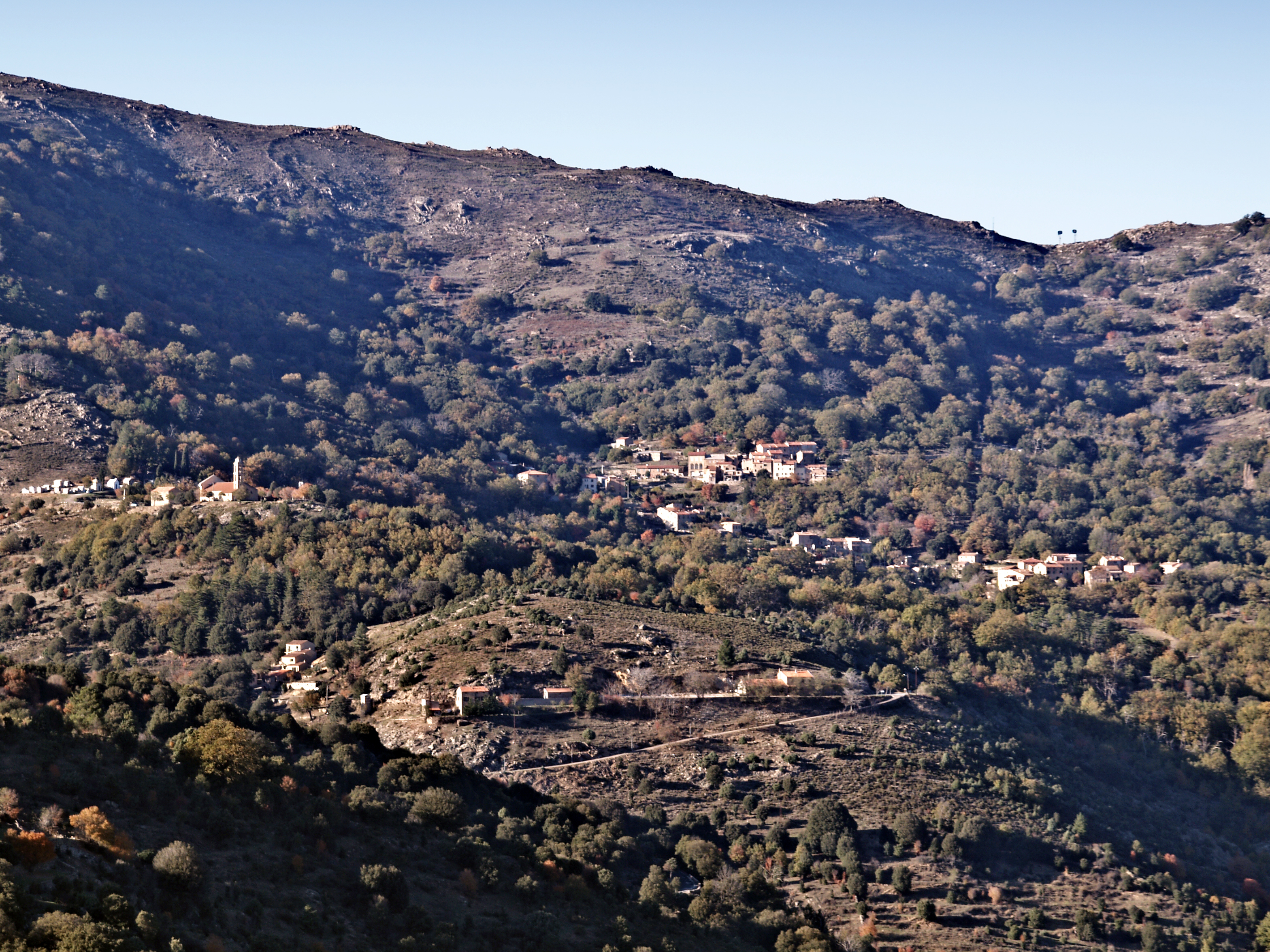 Pioggiola (Corsica) - Vue du village